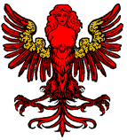 Hárpia_(heraldika)_fr_--_harpie